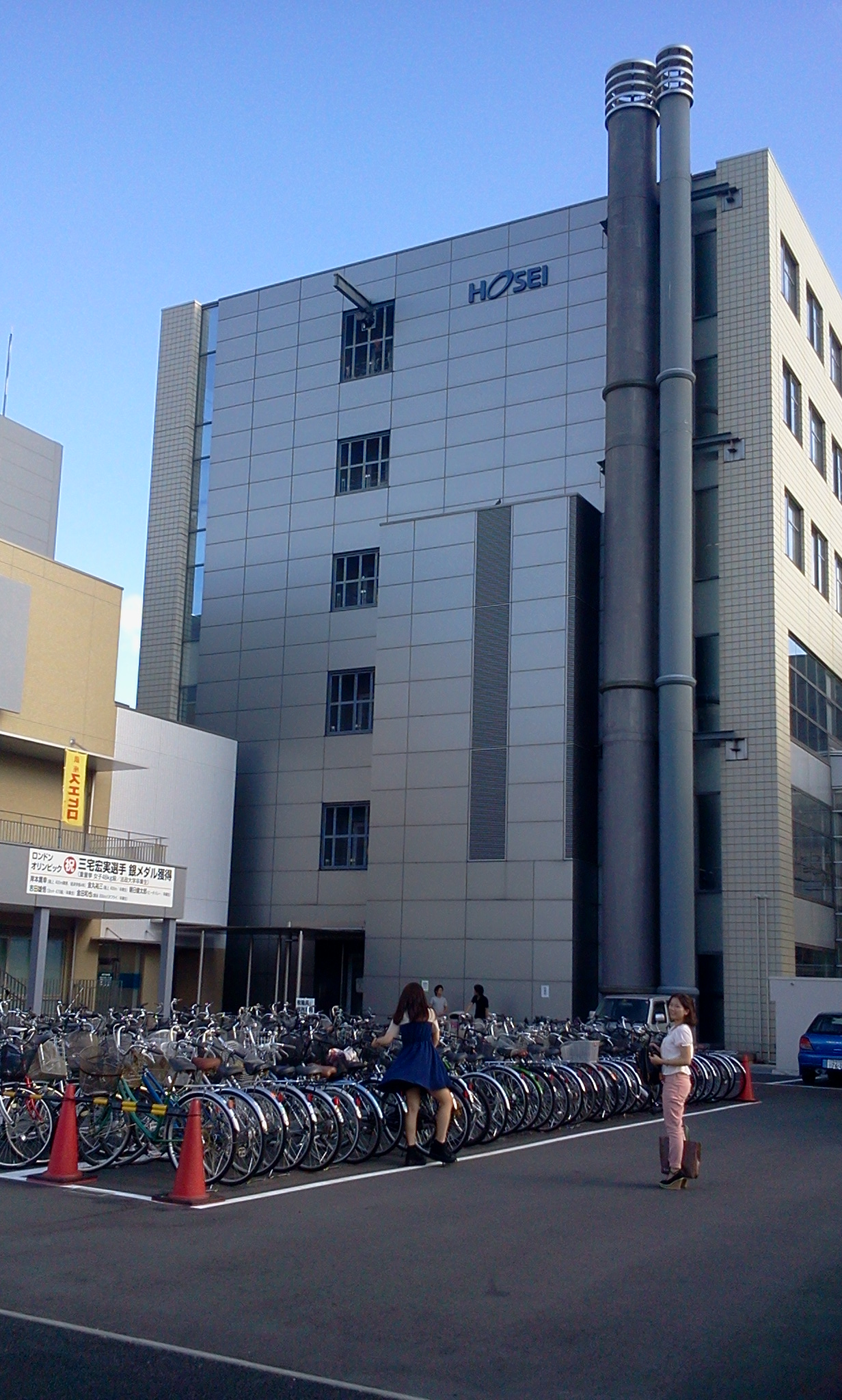 法政大学小金井キャンパス西館